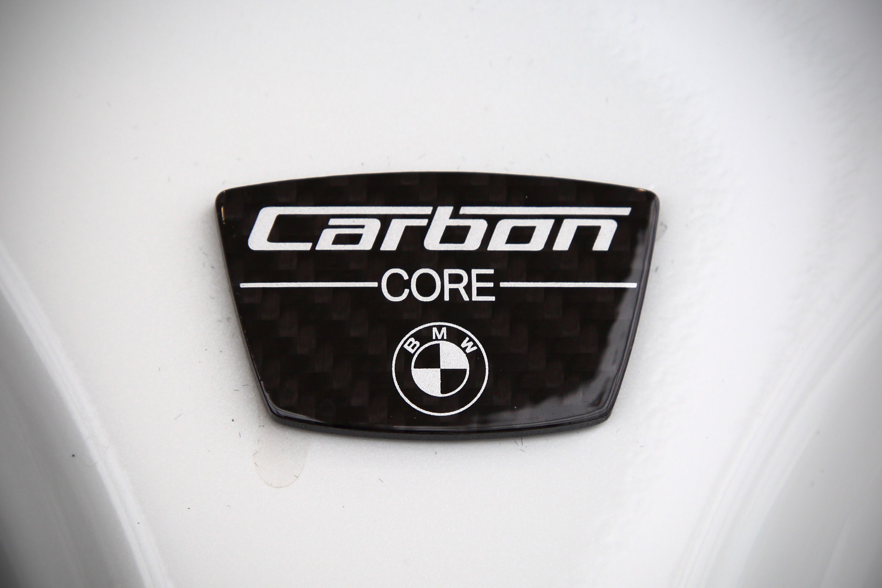 6代目BMW BMW・7シリーズ#6.E4.BB.A3.E7.9B.AE_G11.2FG12.EF.BC.882015.E5.B9.B4-_.EF.BC.897シリーズ]に採用されている「カーボン・コア」構造のエンブレム。 ※ Bピラー上部に所在。